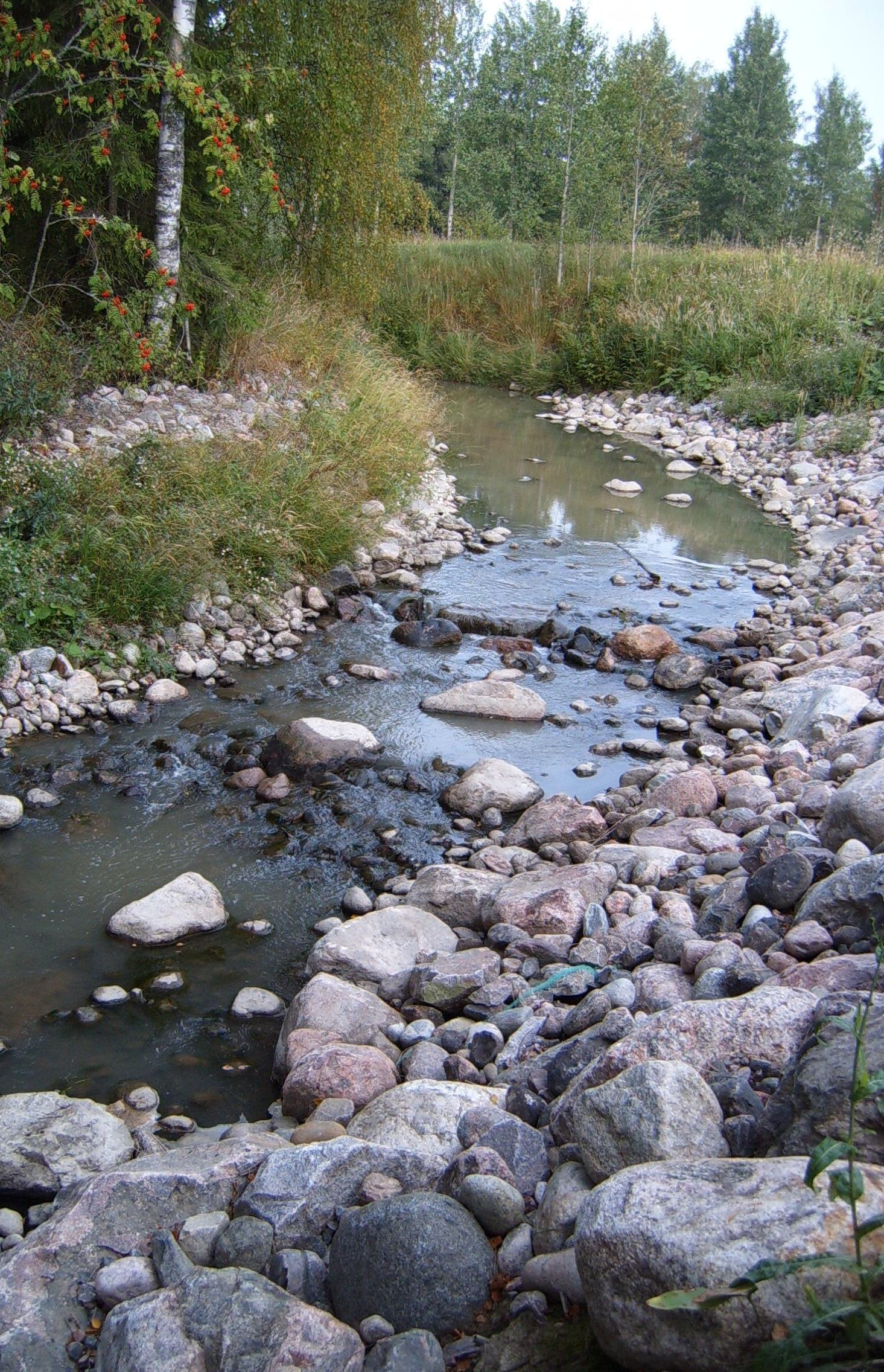 Köylinjoki